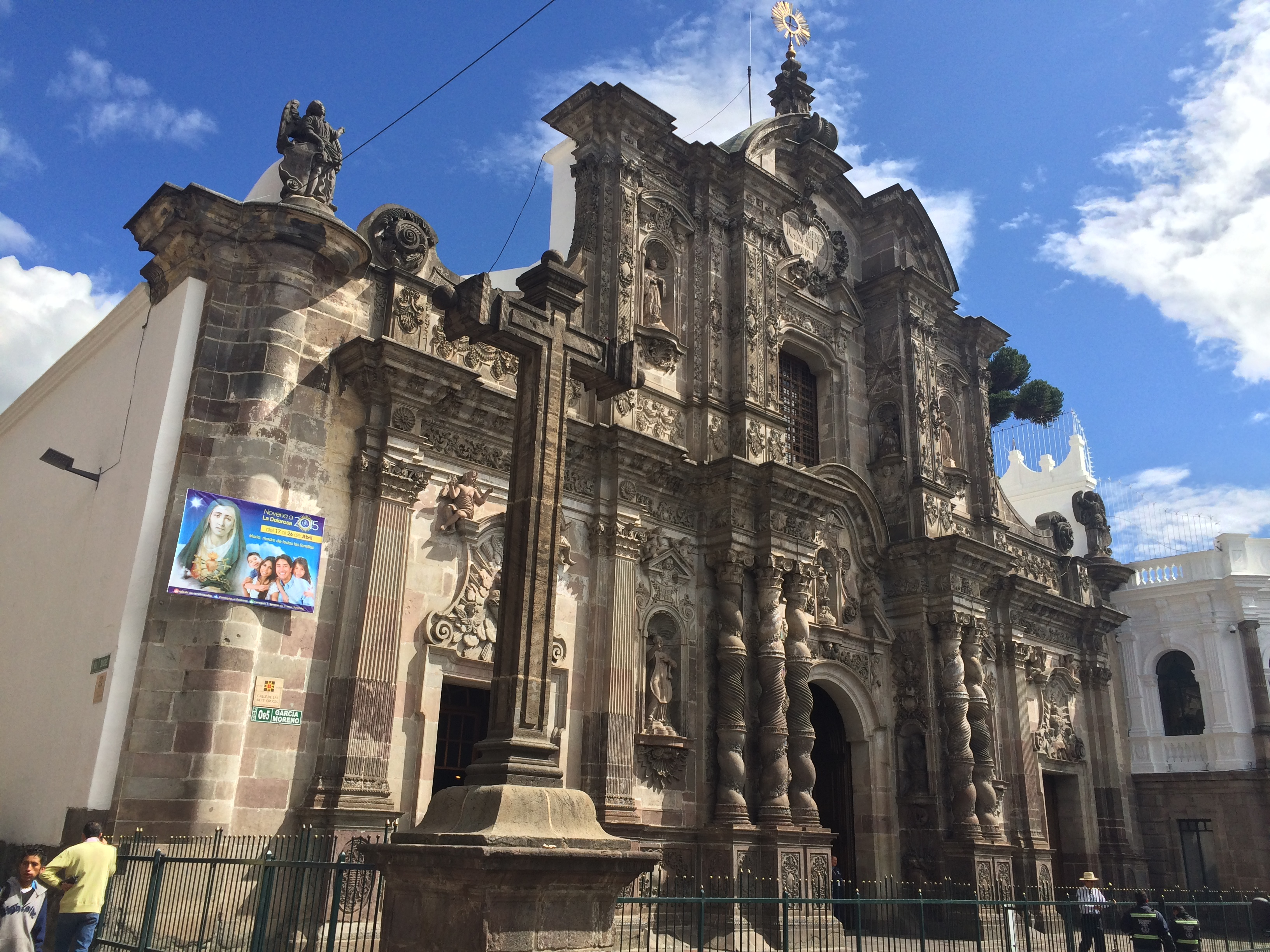 Iglesia Companhia de Jesus - Quito, Equador